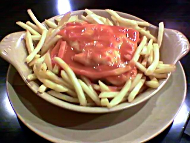 Francesinha